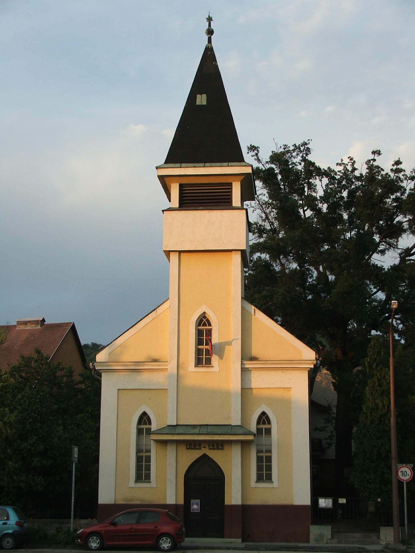 Esztergomi református templom